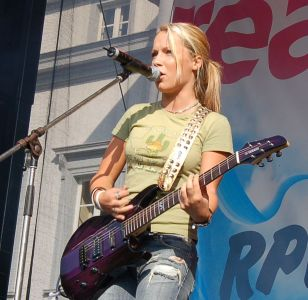 Lenna Kuurmaa playing Live